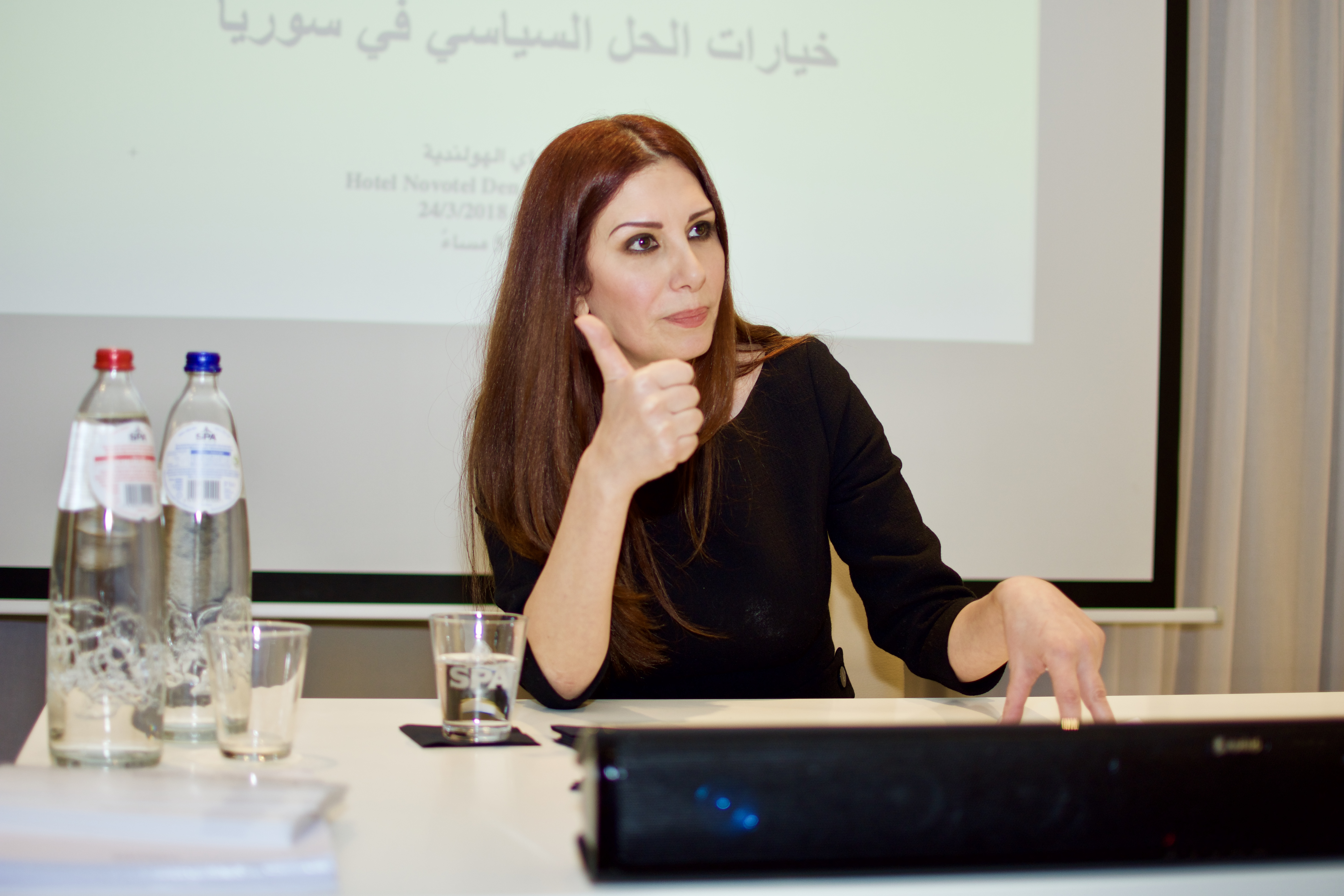 رندا قسيس أثناء محاضرة بعنوان "خيارات الحل السياسي في سوريا"، في مدينة لاهاي الهولندية